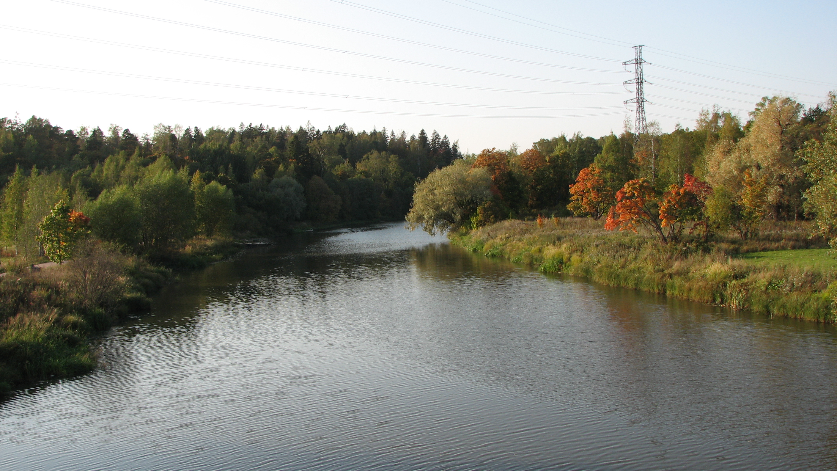 Kuva Vantaanjoesta syksyllä 2007